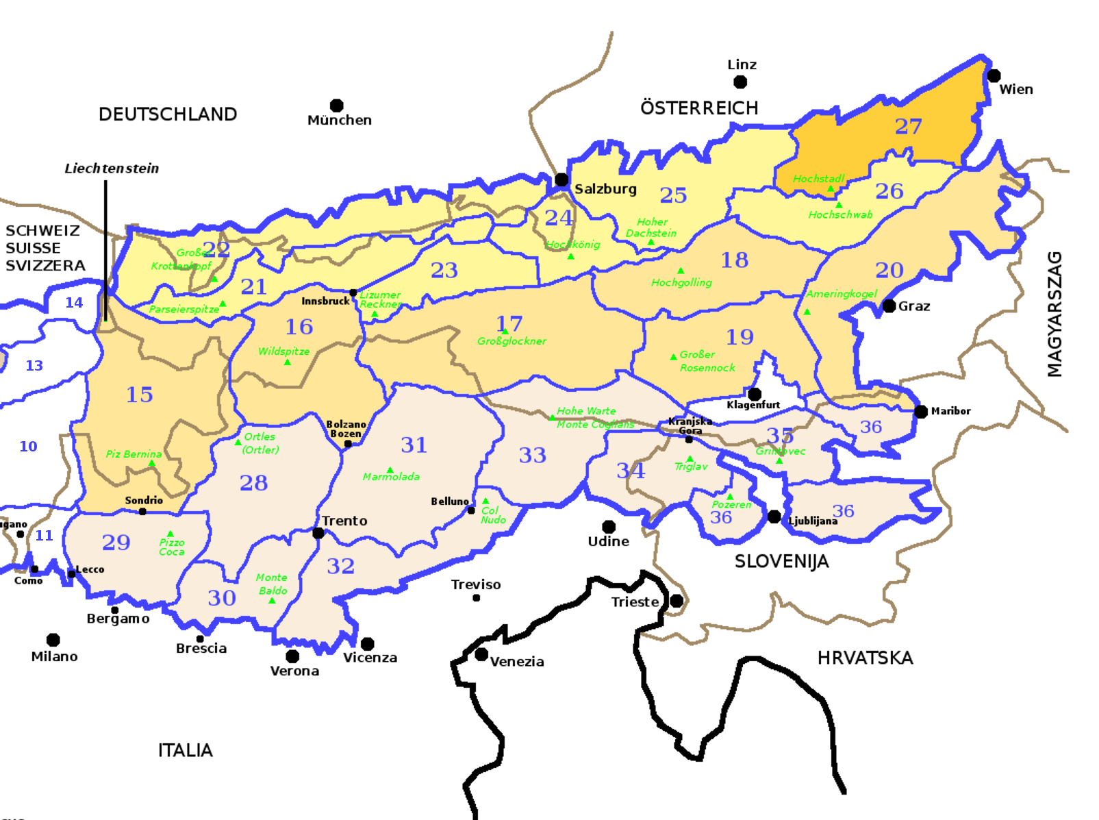 Alpi Orientali secondo la SOIUSA con evidenziate le Alpi della Bassa Austria